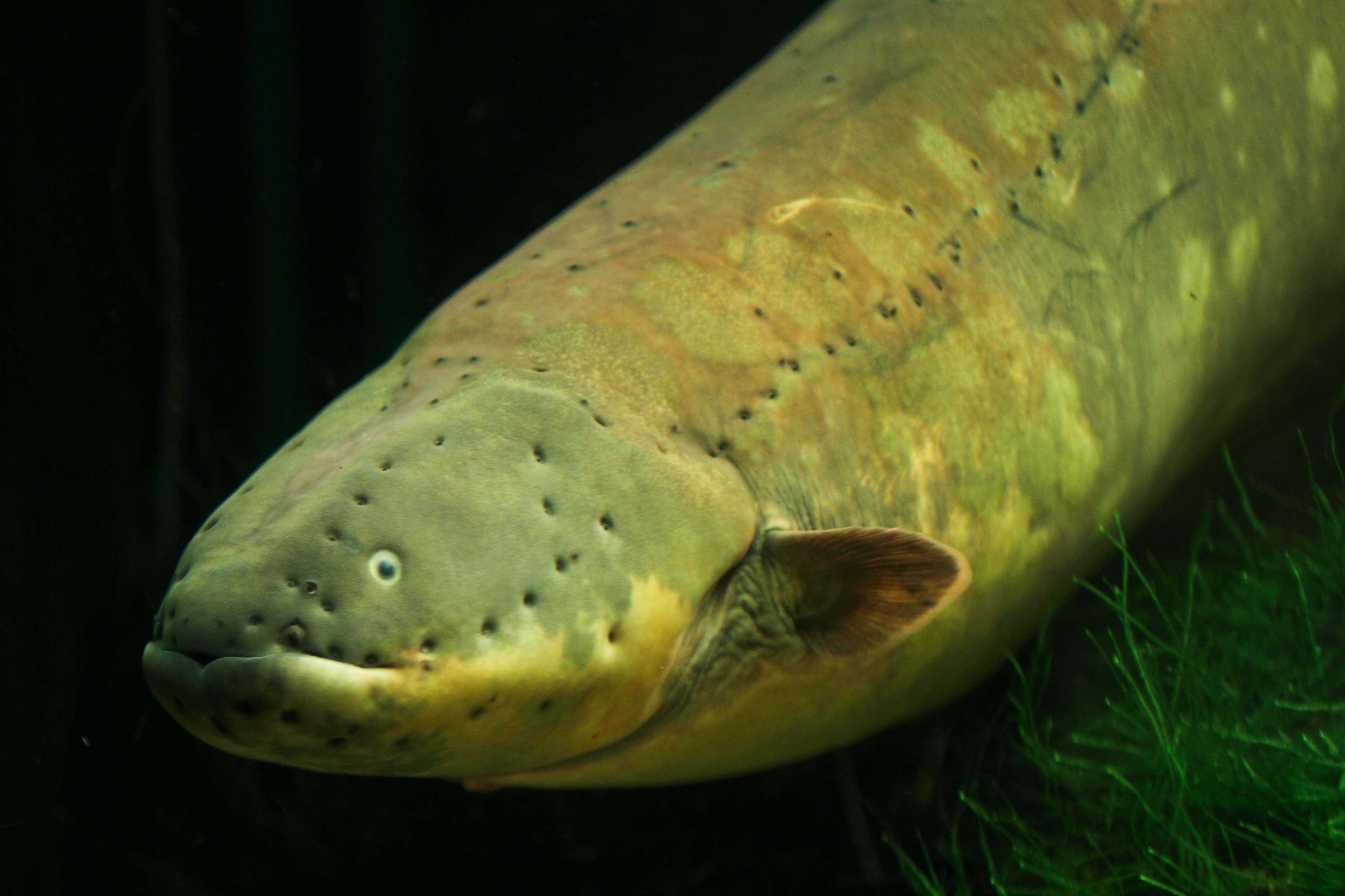 Sidderaal